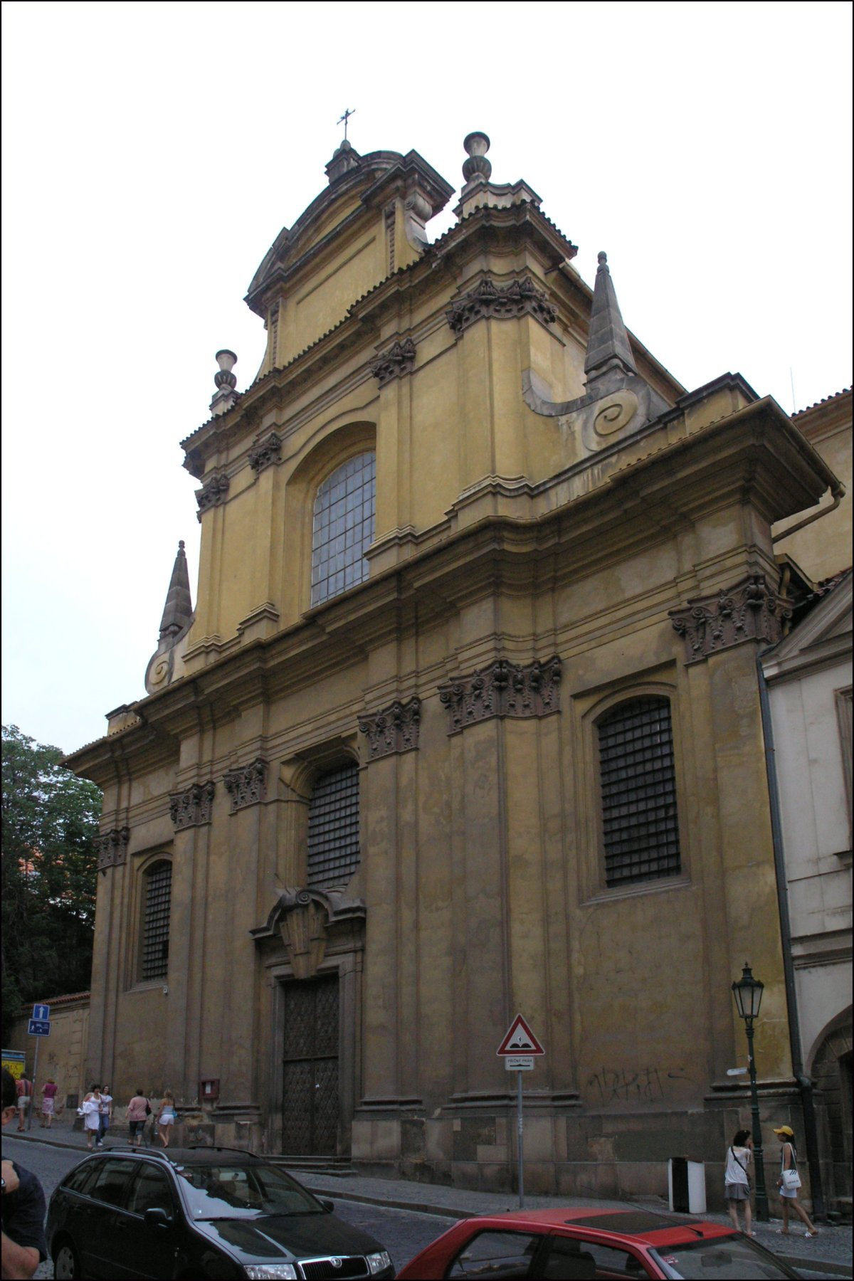 Česky: Kostel Panny Marie Ustavičné pomoci a svatého Kajetána (Praha, Malá Strana, Nerudova ulice)